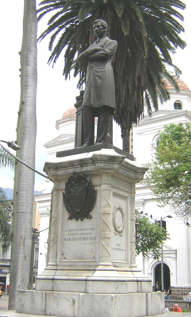 Estatua de Pedro Justo Berrio, ubicado en Parque Berrio, Medellín, Colombia